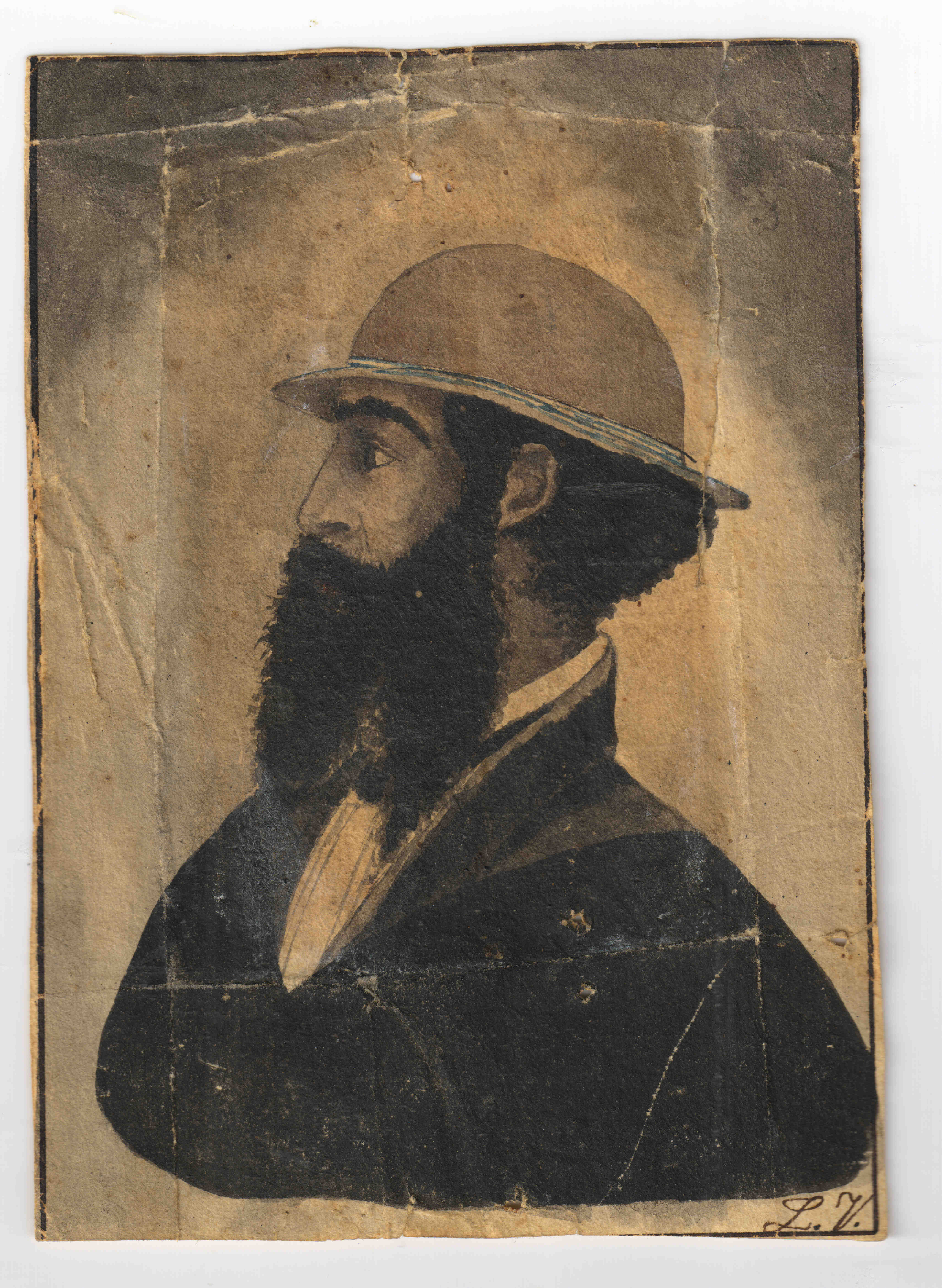 Médico boyacense de mediados del siglo XIX. Retrato a tinta china, hecho en París.